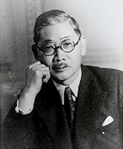 東郷茂徳 Shigenori Tōgō (1882–1950)